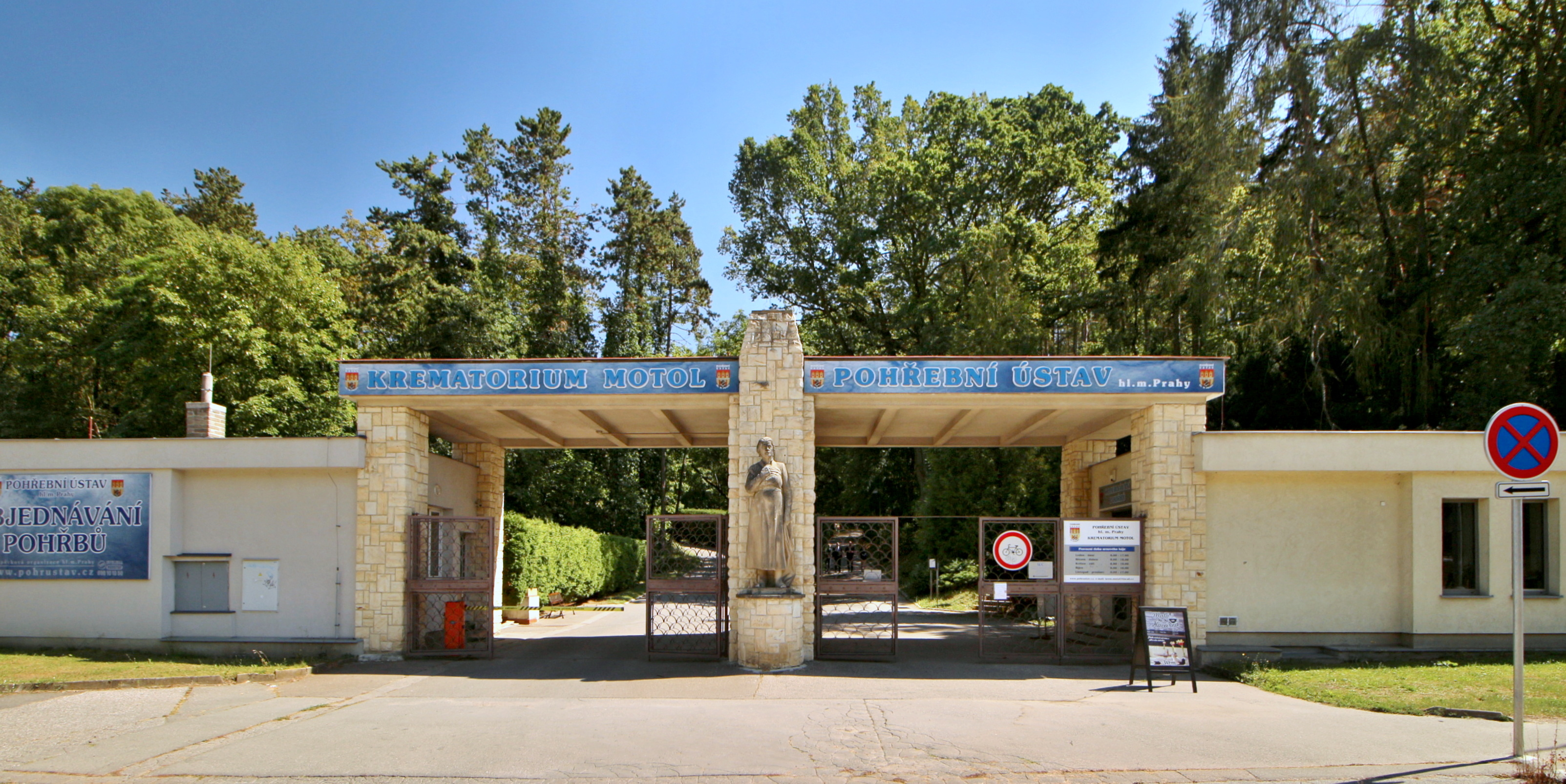 Hřbitov Praha-Motol